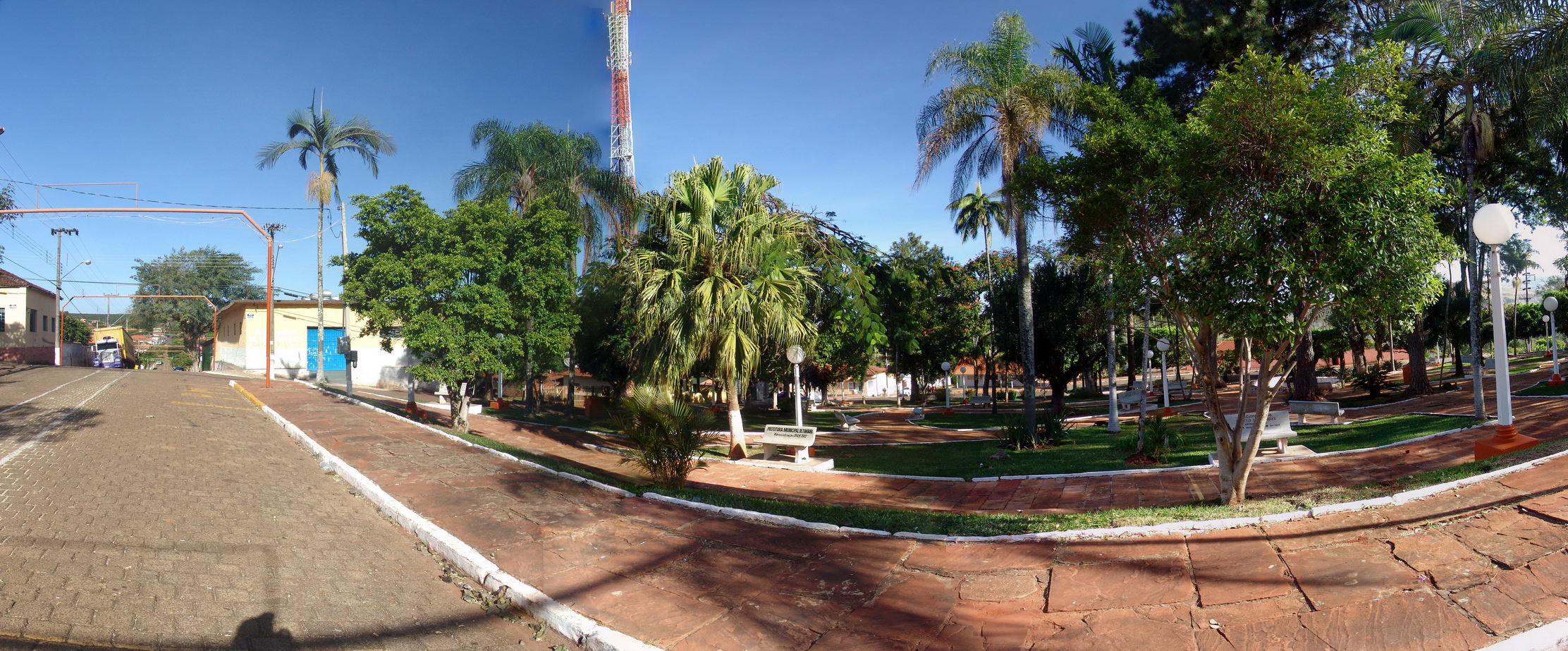 Município de Timburi Brasil